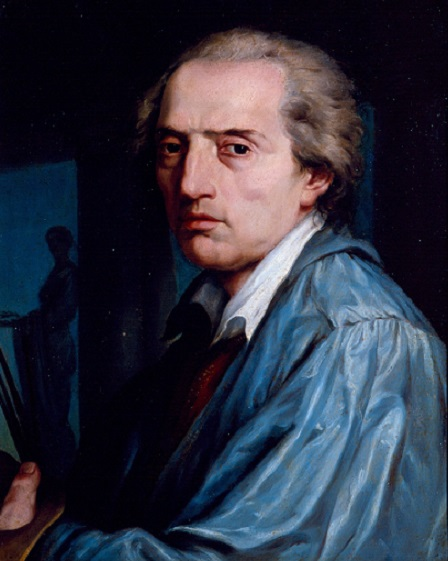 "Ritratto del padre Gaetano Callani", olio su tela, 49 x 40 cm., Galleria nazionale di Parma